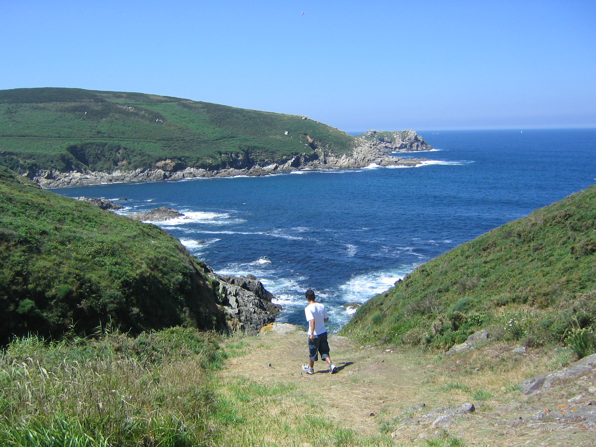 Isla de Ons ensenada de Caniveliñas. Bueu Pontevedra.